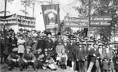 Kotkan Nuorten Työläisten Opintoyhdistys vappuna lippuineen ja banderolleineen.